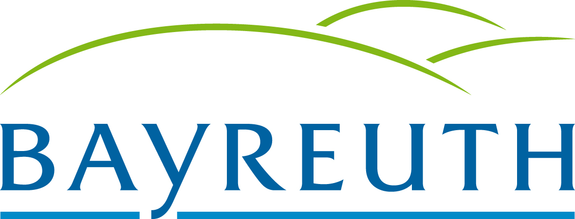 Offizielles Logo der Stadt Bayreuth